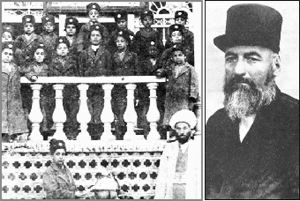 حسن رشدیه (وفات ۱۳۲۳) بنیان گذار آموزش نوین در ایران و شاگردانش